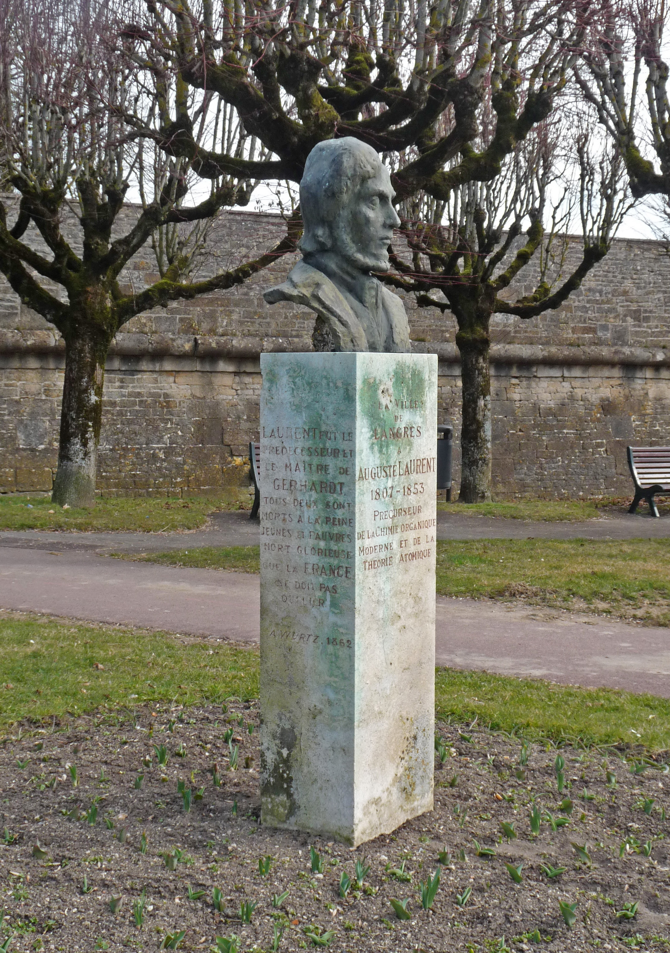 Monument dédié au chimiste Auguste Laurent à l'entrée des remparts de Langres (Haute-Marne).